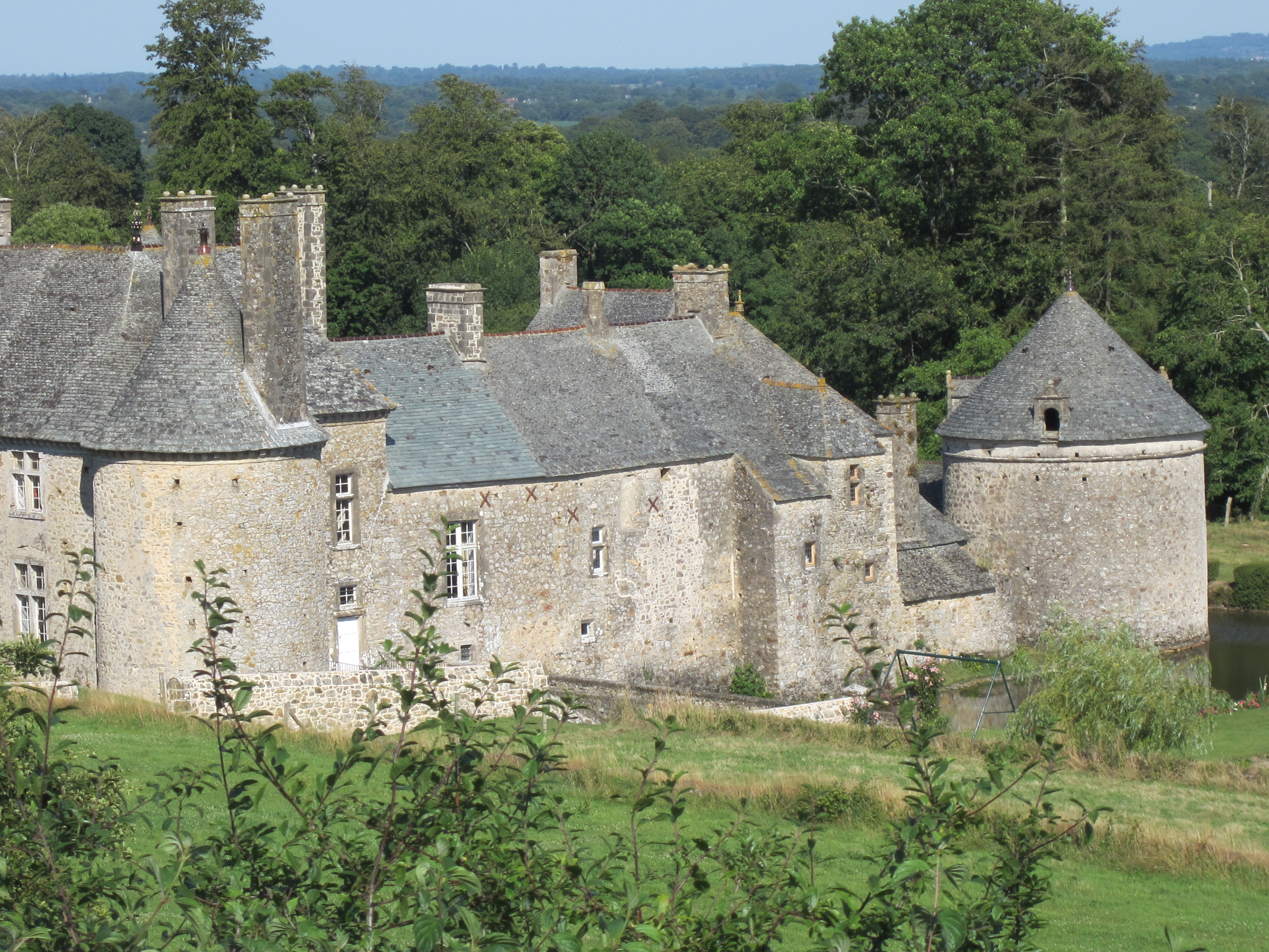 Manoir de la Cour de Saint-Martin-le-Hébert, Manche 16e /18e siècle .